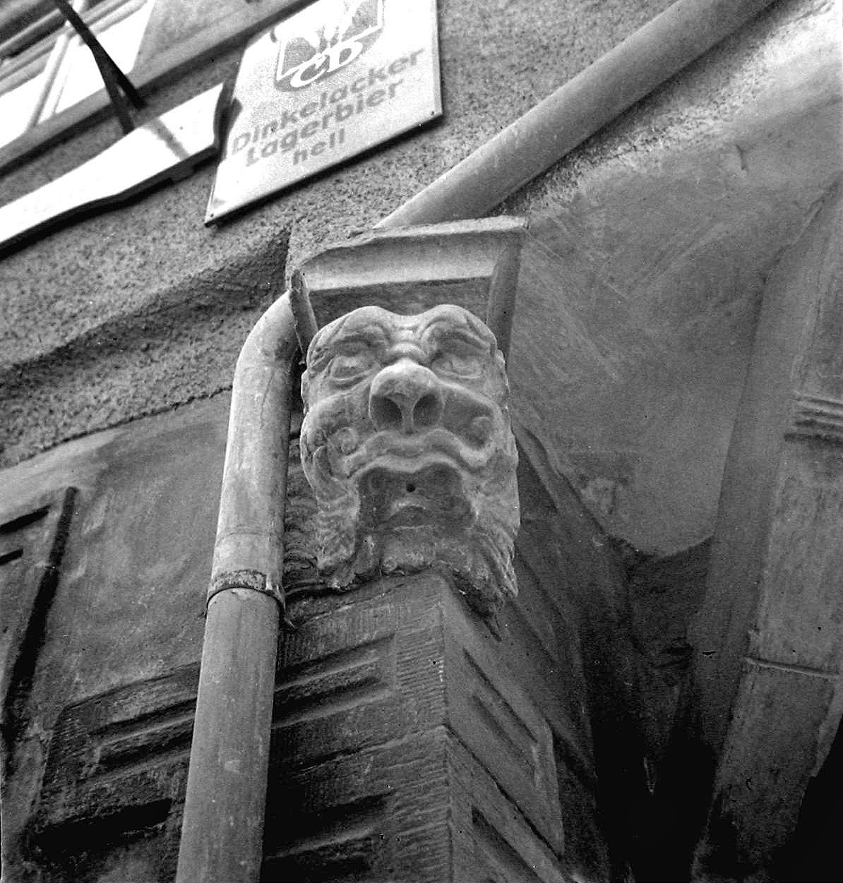 Neidkopf am einst weit auskragenden Haus von Aberlin Jörg & Sohn in Markgröningen (Ostergasse 16 vor dem Teilabriss) Der Neidkopf an der nordwestlichen Gebäudeecke ist erhalten, das auskragende Fachwerk nicht.